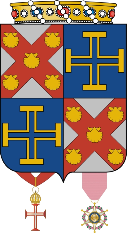 Esquartelado: I e IV - Rocha: de prata, com aspa de vermelho carregada com cinco vieiras de ouro; II e III - Teixeira: de azul com uma cruz potenteia de ouro vazia do campo. Coroa de Barão. Medalhas; comendador da Ordem Militar de Cristo e cavaleiro da Imperial Ordem da Rosa.